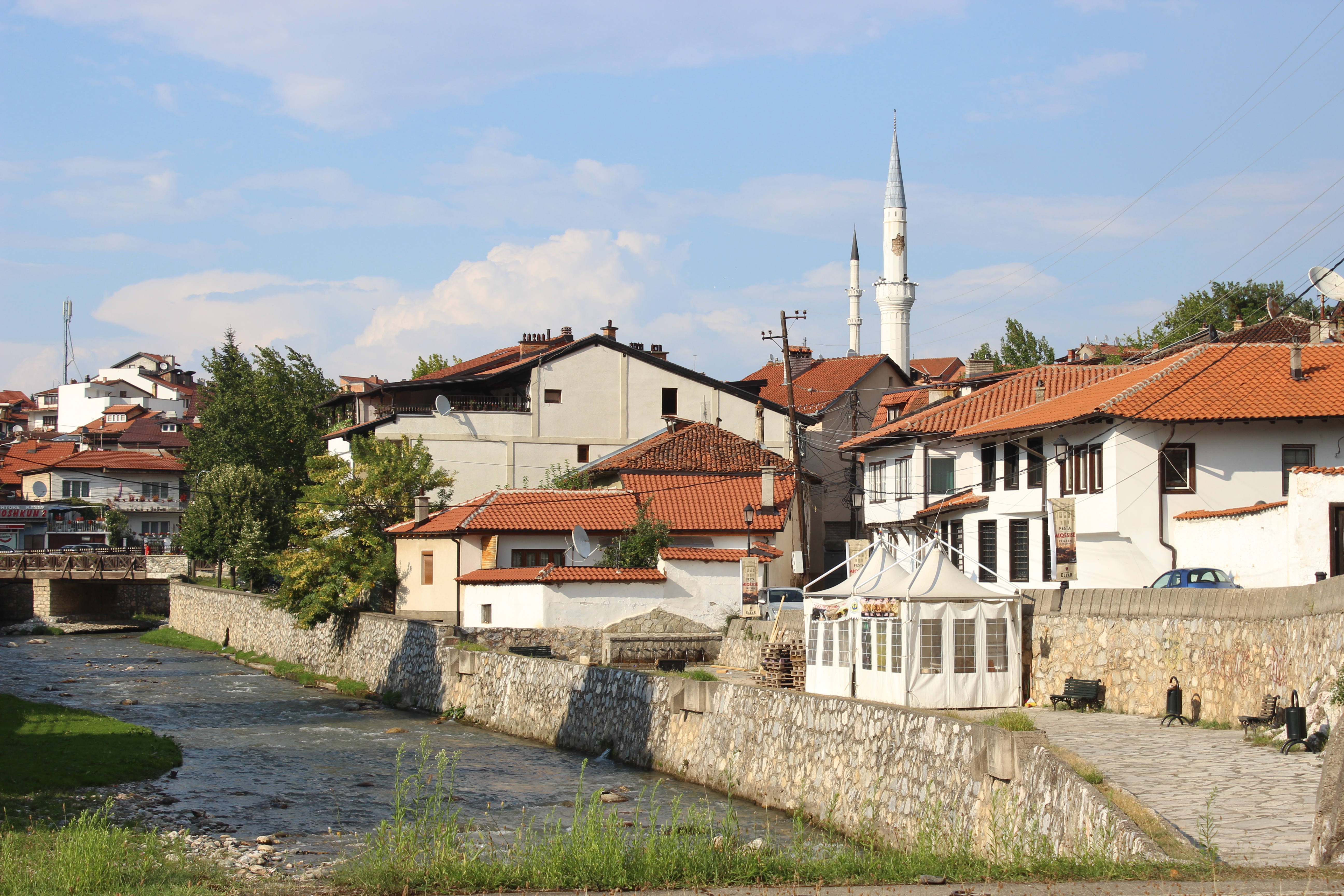 Prizreni madheshtor